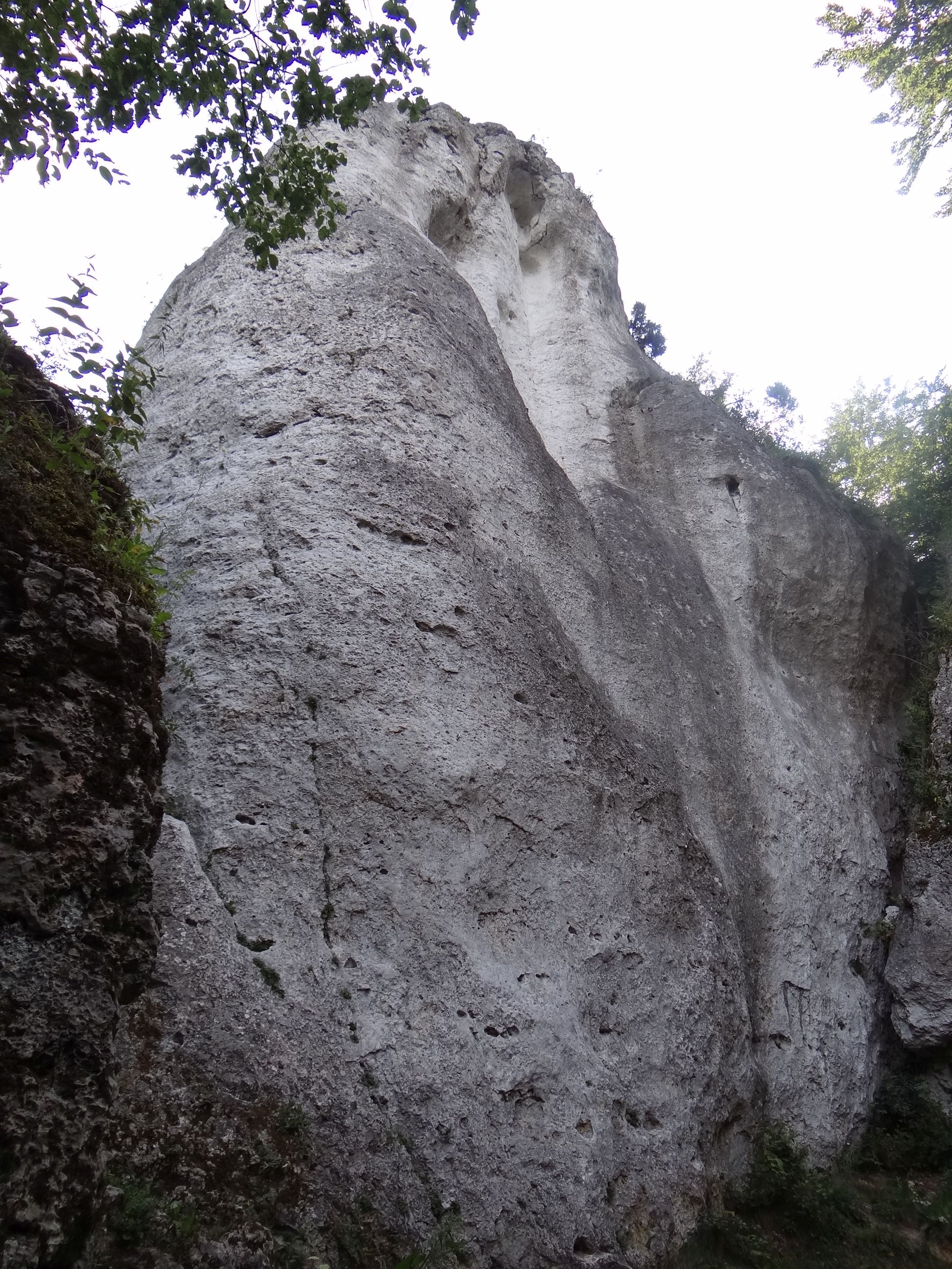 Skała Flaszka w grupie Skał Rzędkowickich na Wyżynie Częstochowskiej